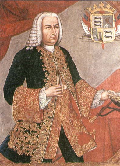 Portrait of Sebastián de Eslava (1685-1759)